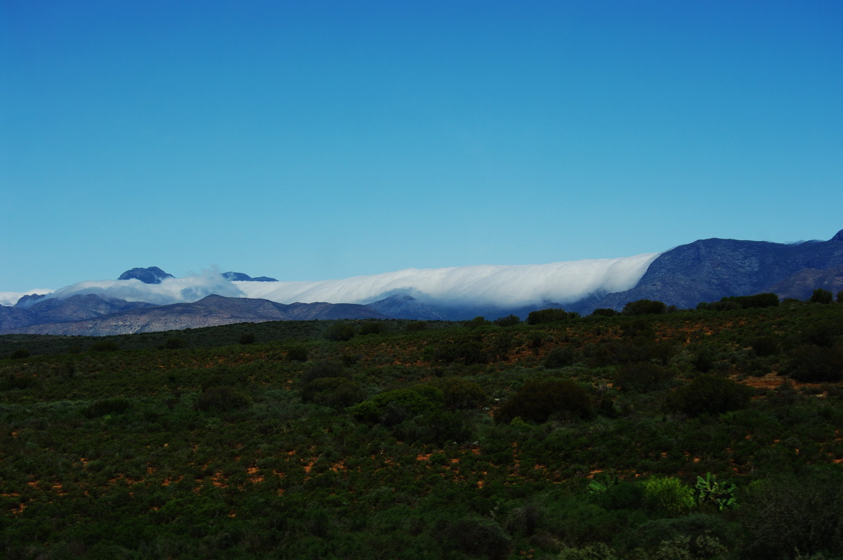 Outeniqua-Gebirge im Süden der Kleinen Karoo